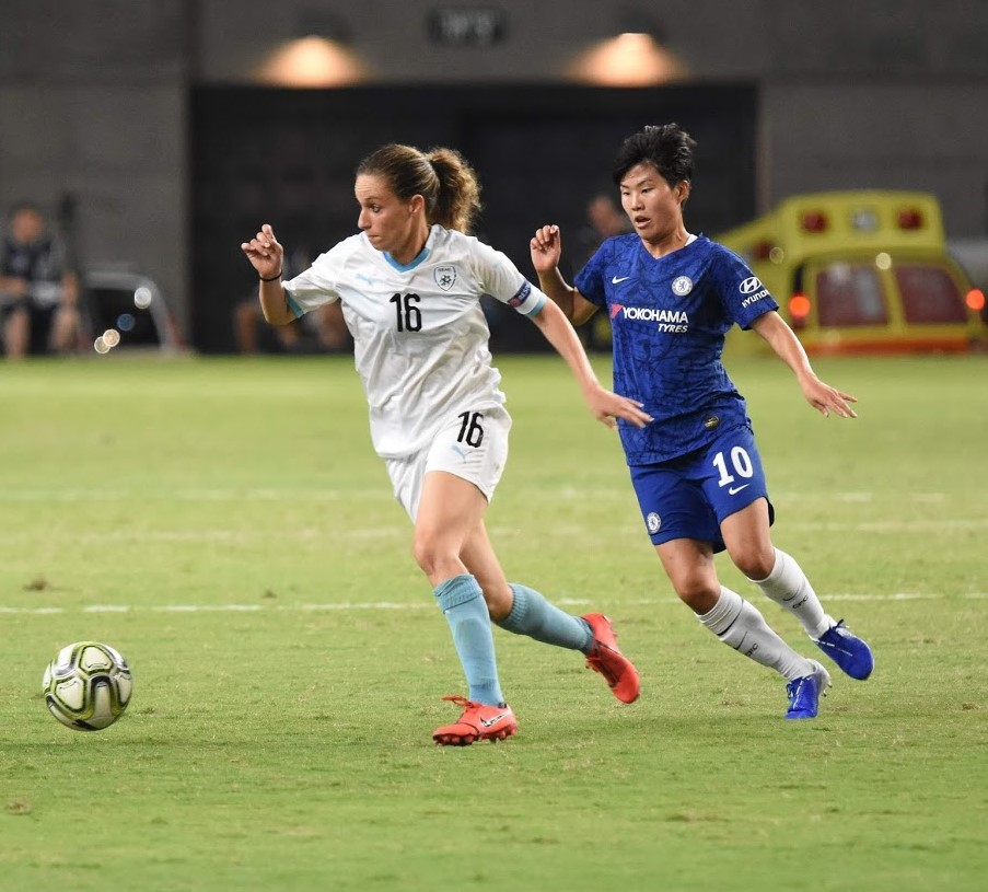 קארין סנדל במדי נבחרת ישראל נגד צ'לסי